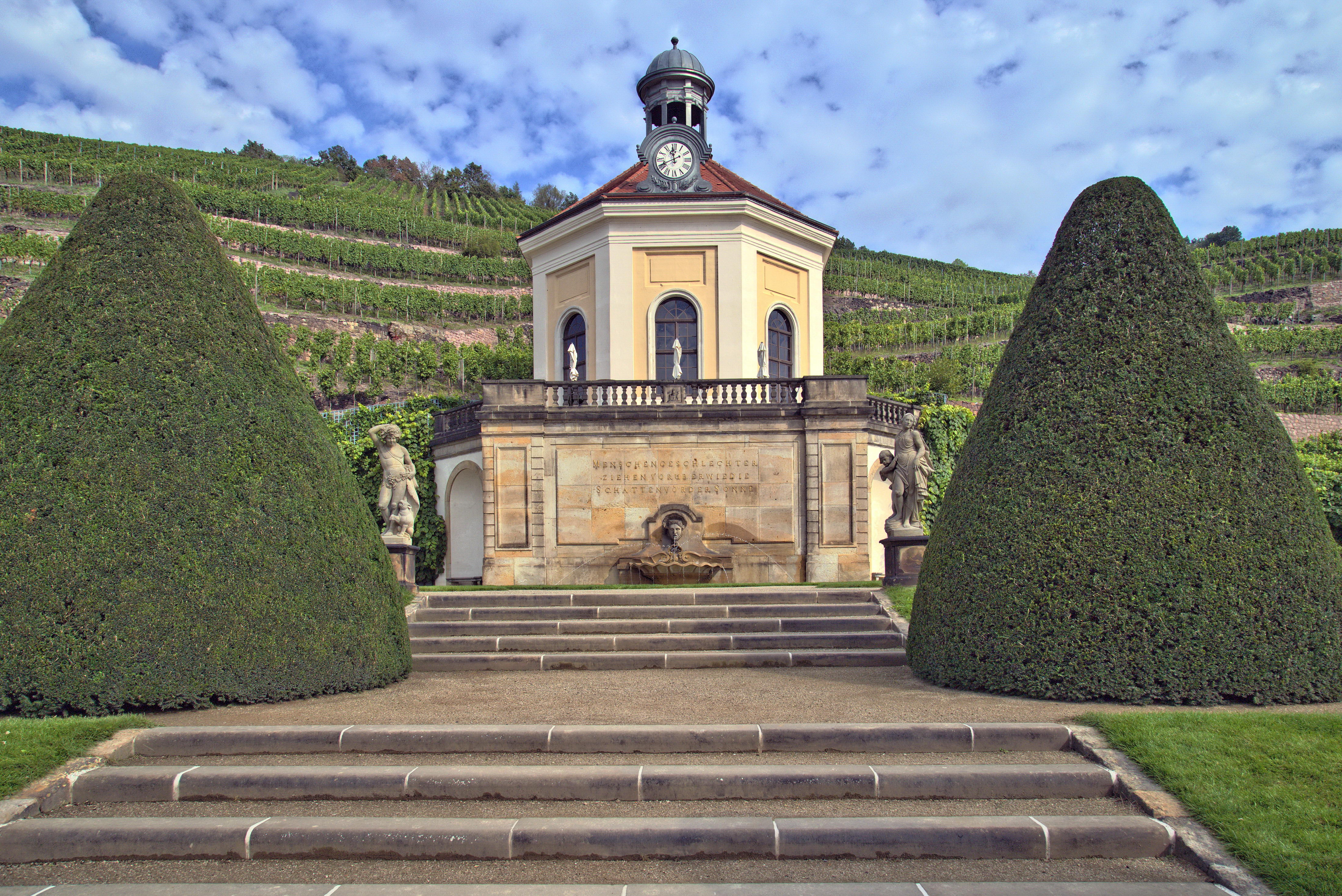 Radebeul, BelvedereWackerbarthstraße 1, Denkmalspflege: 9001-I